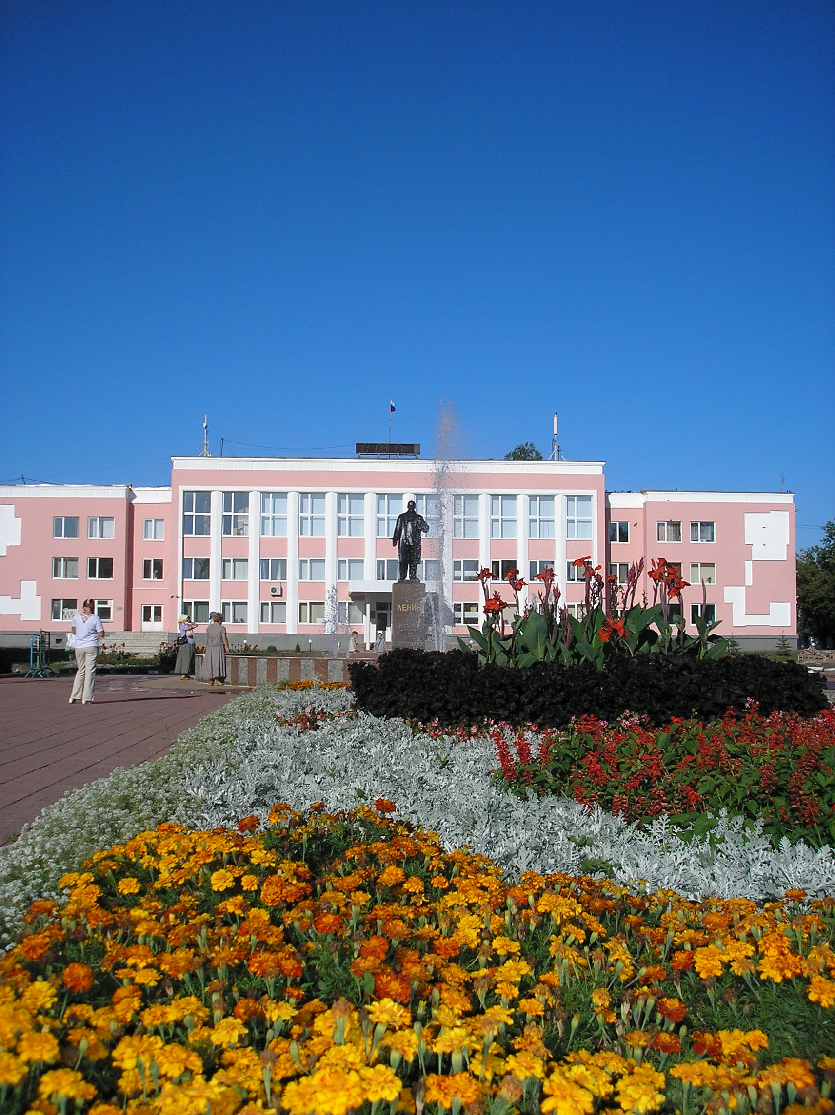 Памятник В.И.Ленину на площади 1100-летия г.Мурома,Муром,2007